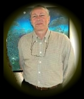 Louis Marius Ferreira